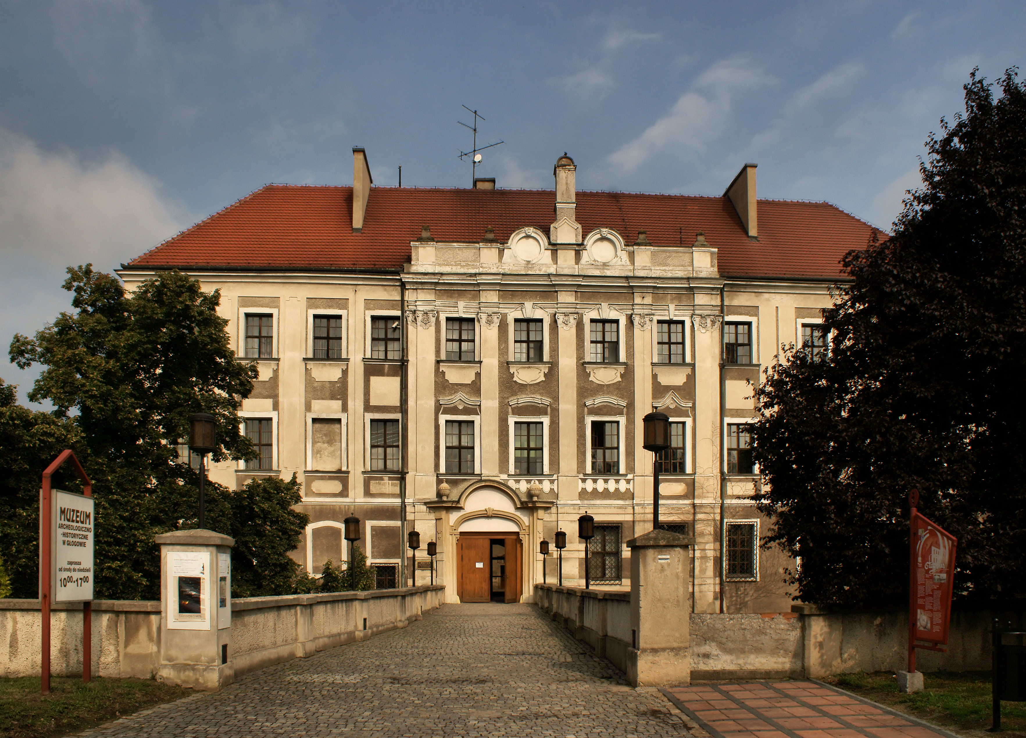 Głogów, ul. Brama Brzostowska 1 - zamek książęcy, XIII, XX